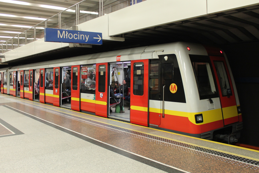 Alstom Metropolis 98B (pociąg nr 17 w nowej malaturze obowiązującej od 2014) stoi na stacji A7 Wilanowska.